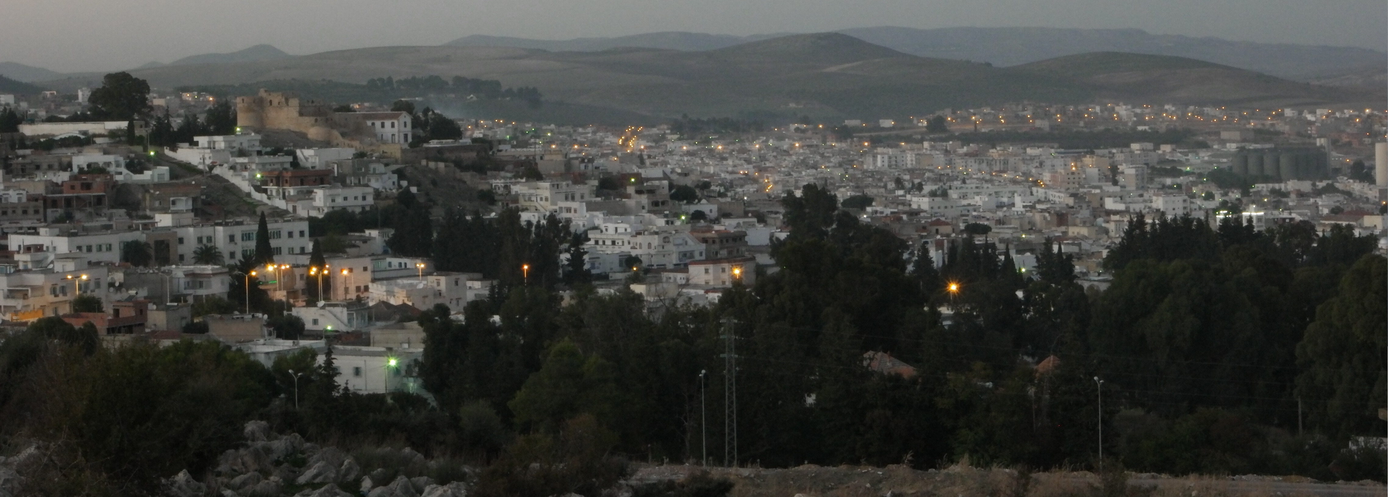 Skyline Béja